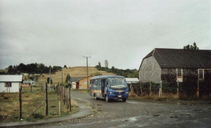 Terminal en Aldachildo, Isla Lemuy, Provincia de Chiloé, Chile